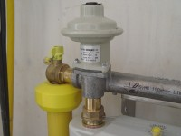 Eigen foto